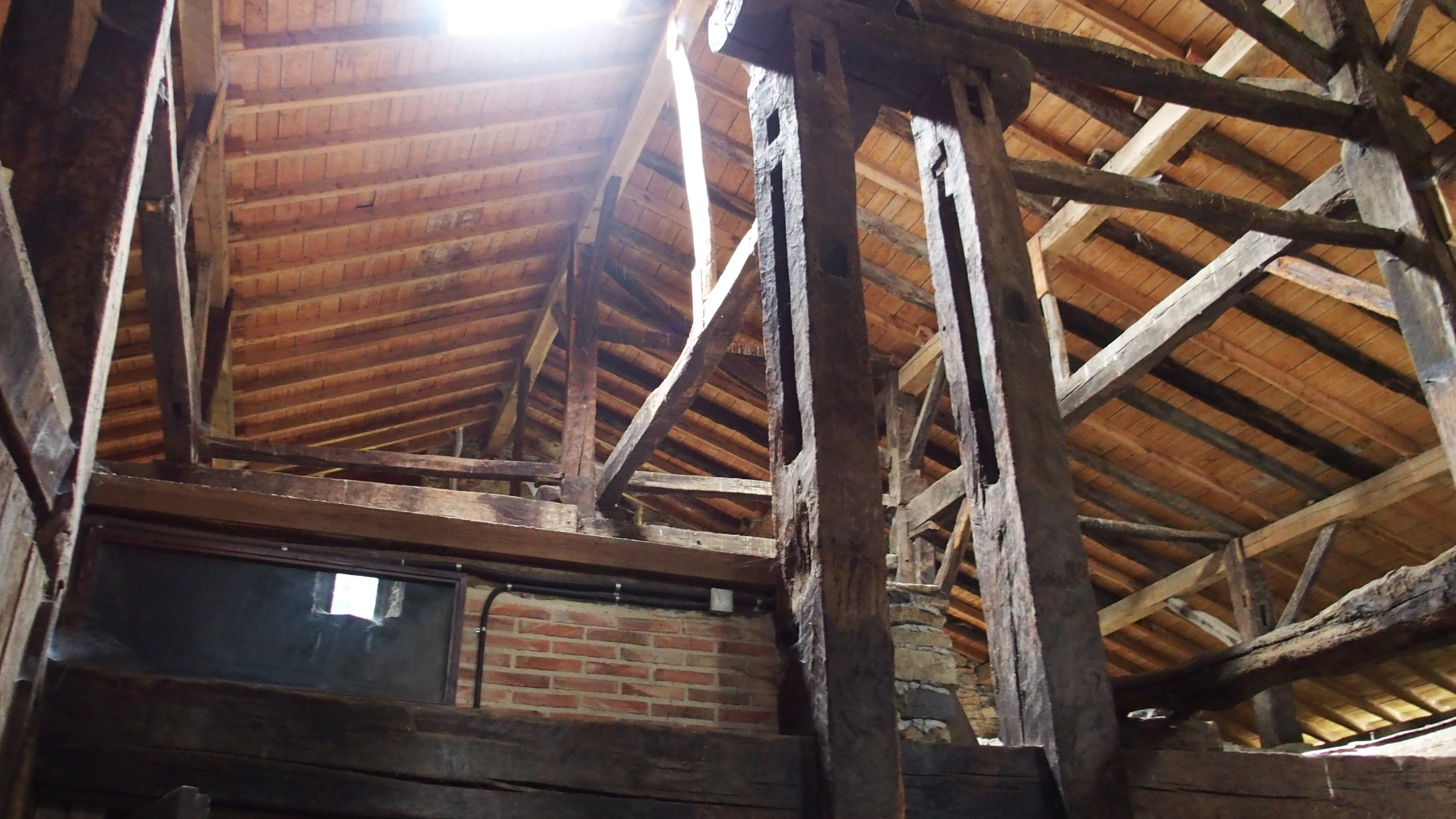 Eguren baserriko goiko pisua barrutik. Ezkerrean garai bateko dolarea ikus daiteke Irudi hau Wikibizi kanpainaren baitan igo da, Euskal Wikilarien Kultura Elkarteak 2020an deitutako argazki lehiaketa hirukoitza. Helburua, Euskal Herria hobeto ezagutzen laguntzea da.Lagundu zuk ere irudi hau dagokion artikuluetan txertatzen.